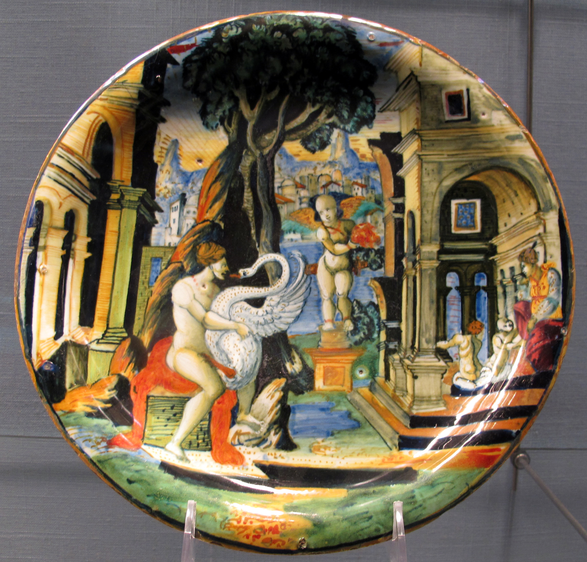 Objects d'art nel Metropolitan Museum of Art